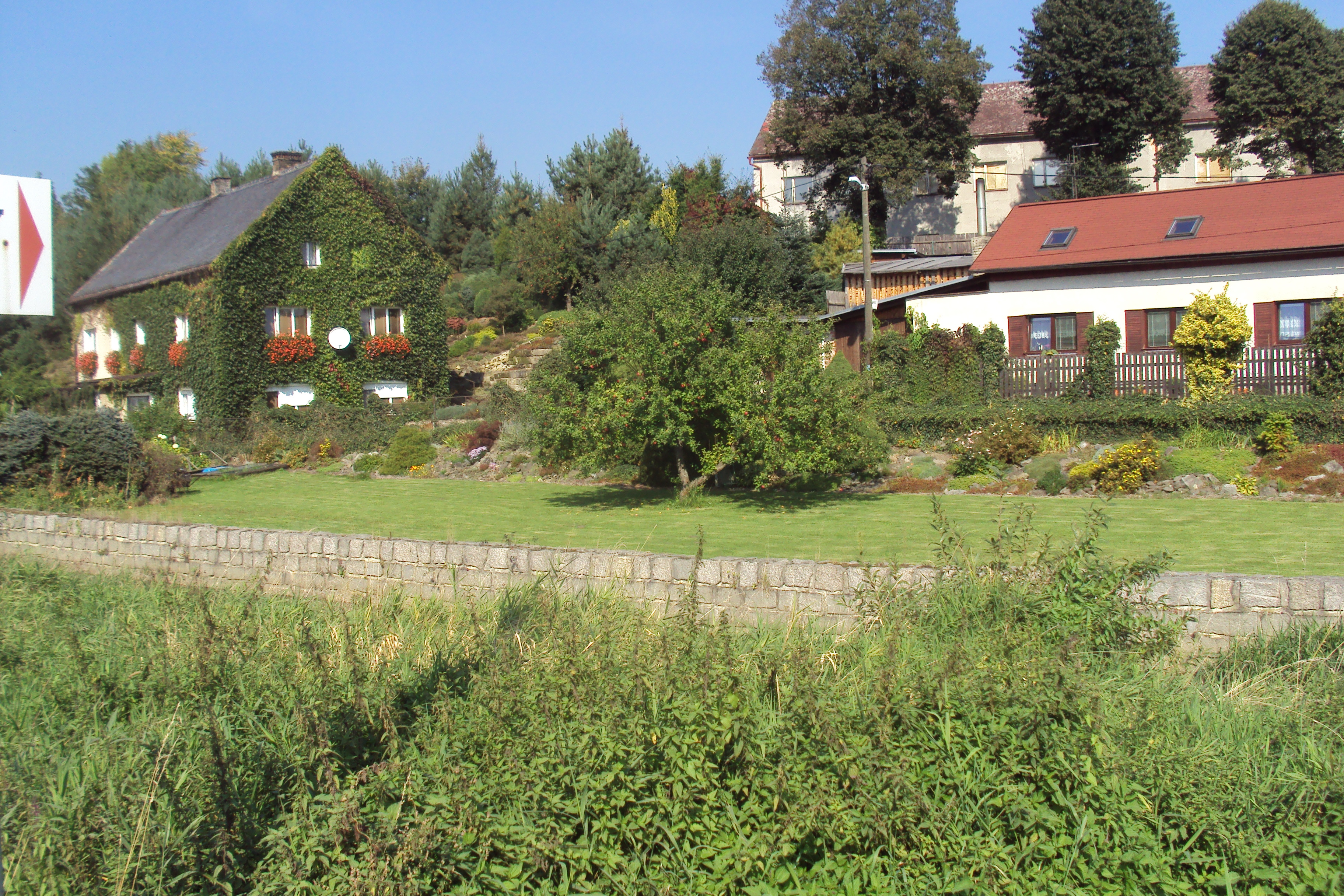 Domy v obci Bukovany u Nového Boru